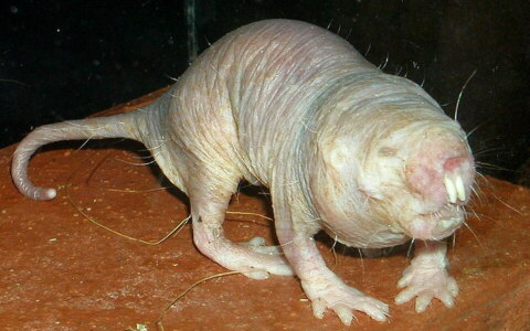 Animal de piel añeja con torniquetes dorados de la selva precolombina